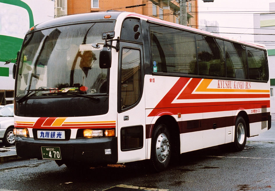 九州観光バス KL-RU1JHEA 西工ネオロイヤルC-I